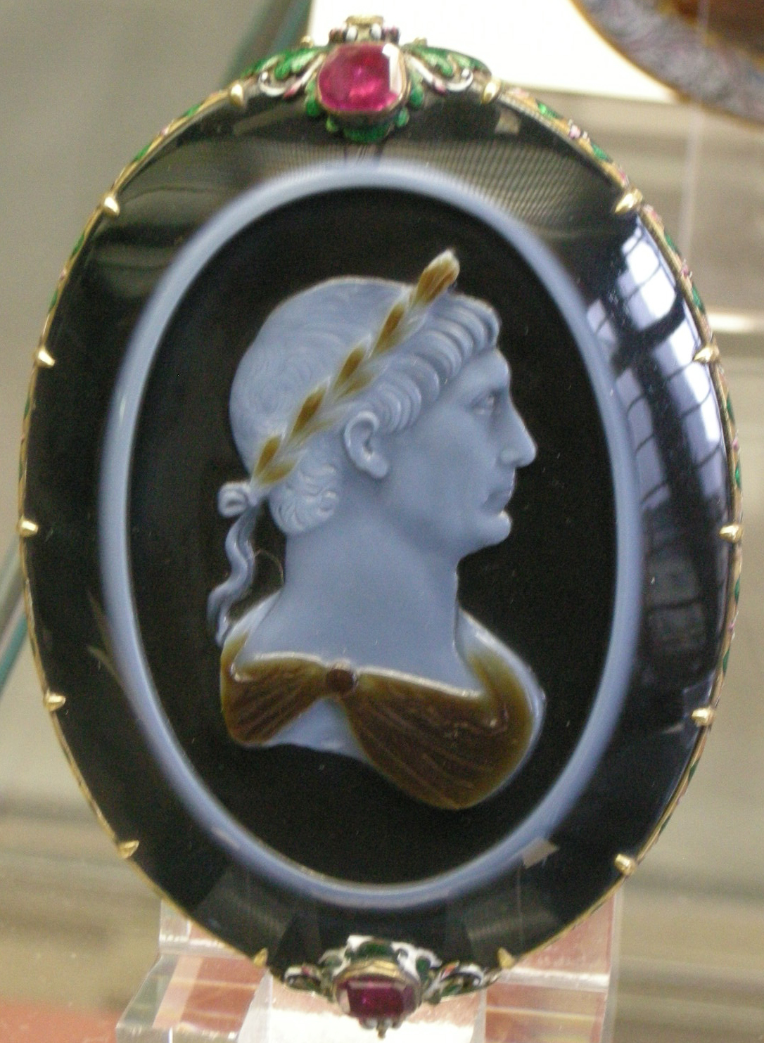 CdM, busto di traiano, 100 dc. circa, cornice con due rubini della fine del XVII sec.